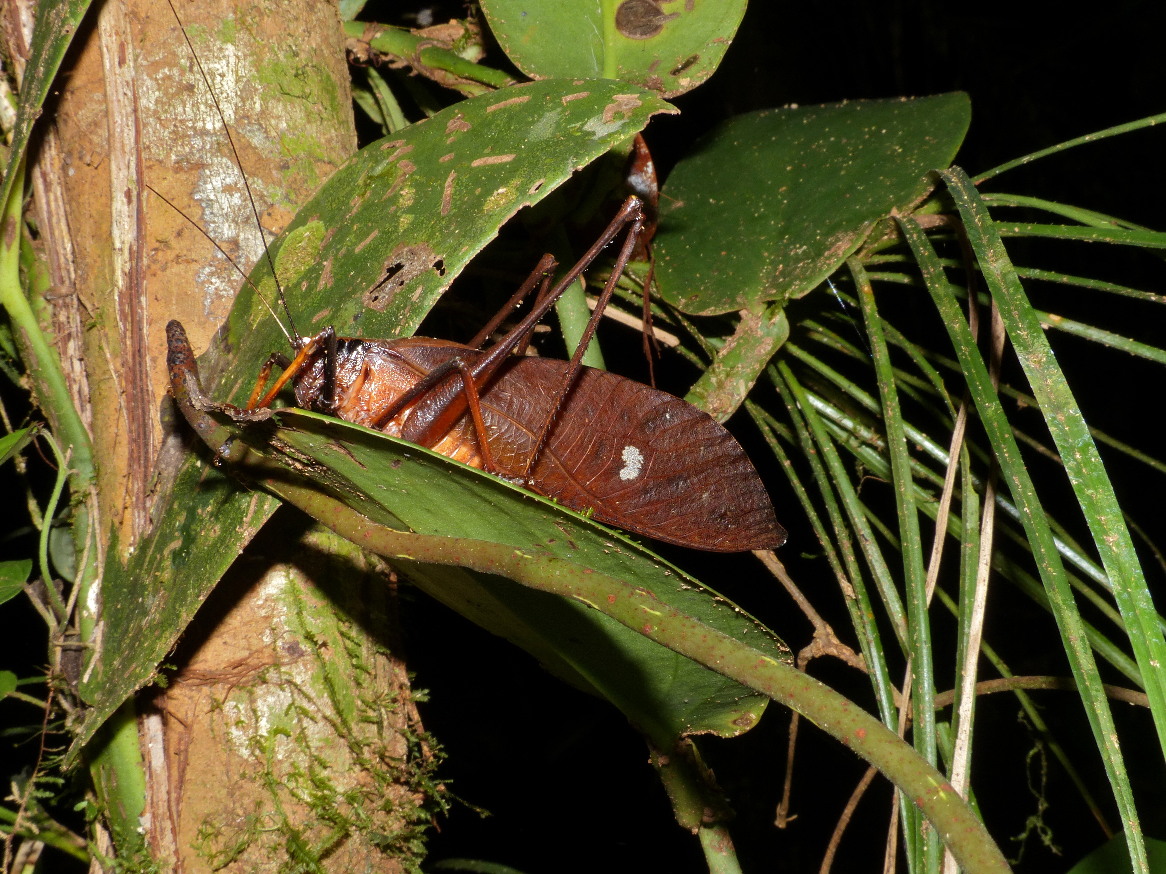 Night Walk Trail, Mulu NP, Sarawak, MALAYSIA